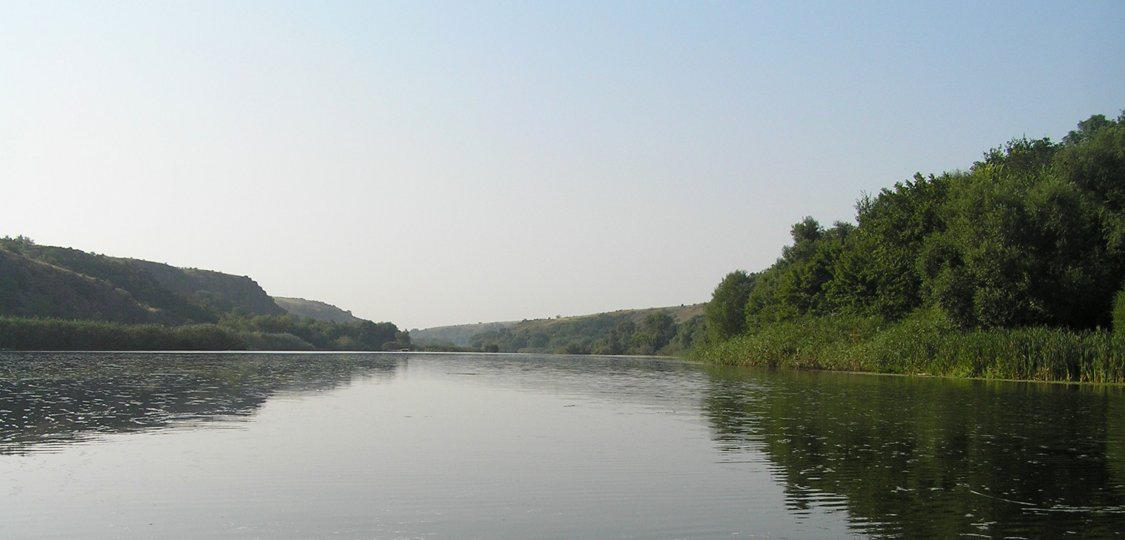 Південний Буг в спокійній течії на південь від м. Первомайськ (Миколаївська область)